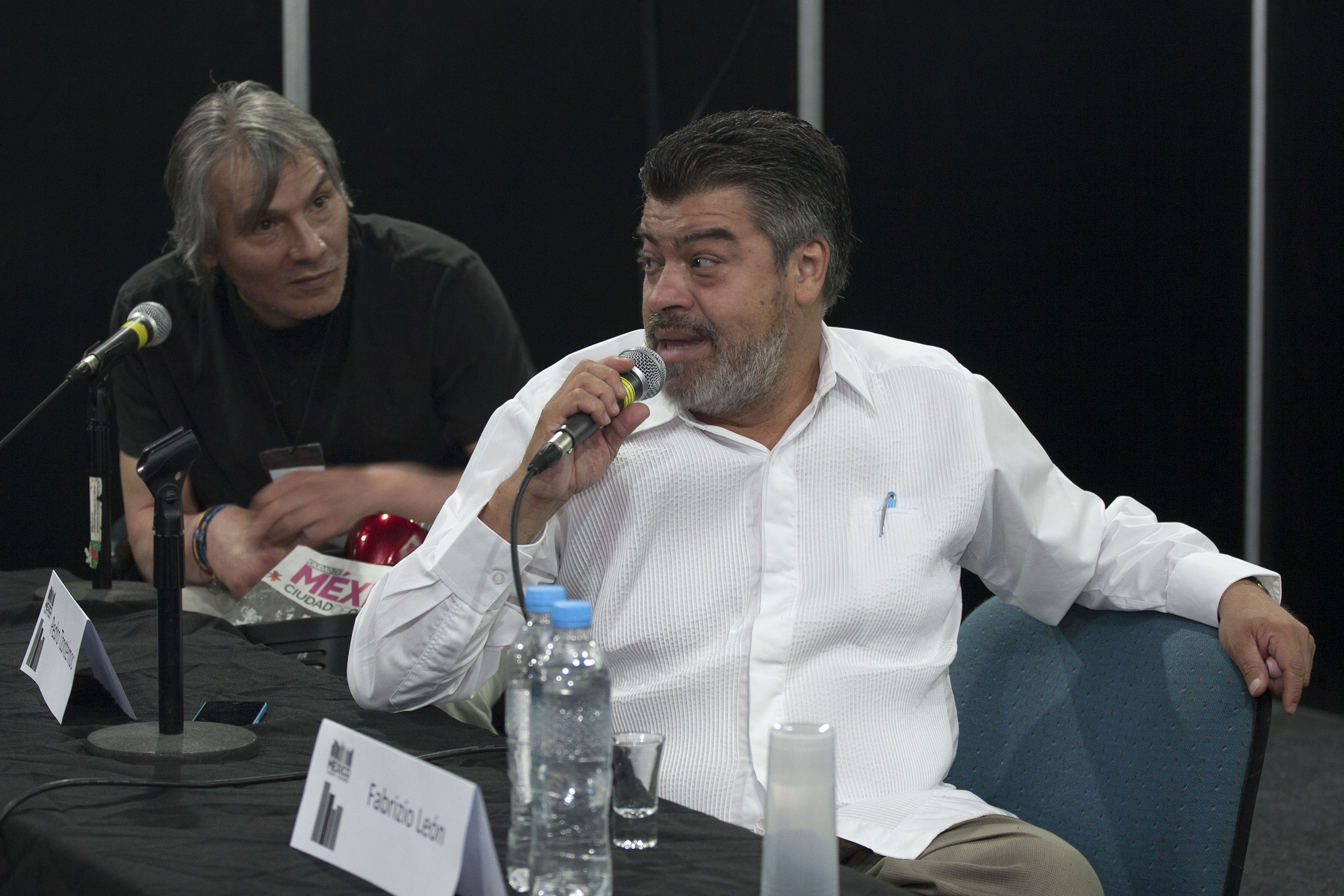 Viernes, 24 de Abril 2015. En el marco de la 41a Feria Internacional del Libro de Buenos Aires se realizó la charla con los fotógrafos mexicanos Fabrizio León y Pedro Tzontémoc en el Salón Haroldo Conti. Foto: Antonio Nava / Secretaria de Cultura CDMX.